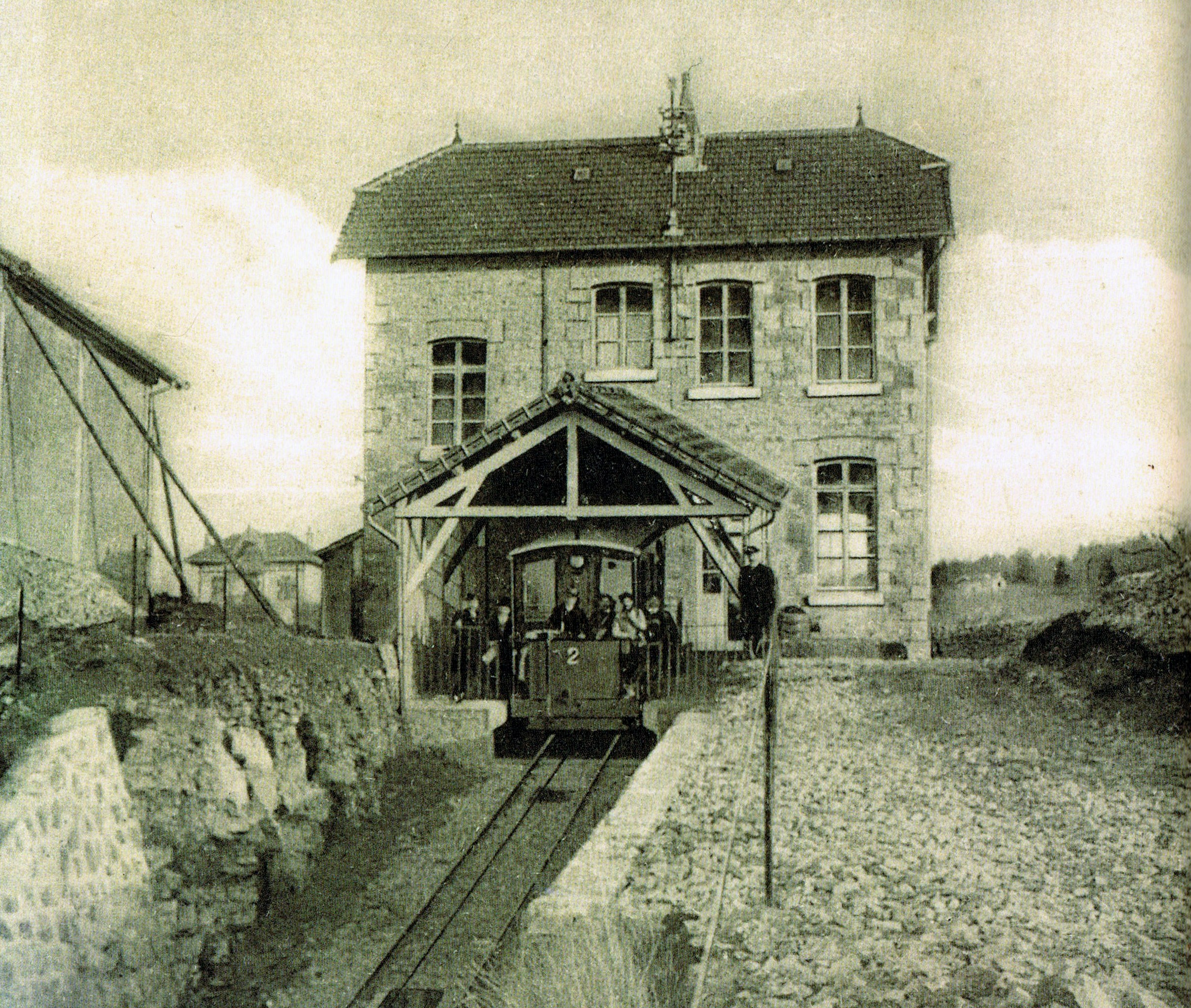 La gare du haut au funiculaire de Bregille, au début du XXe siècle.